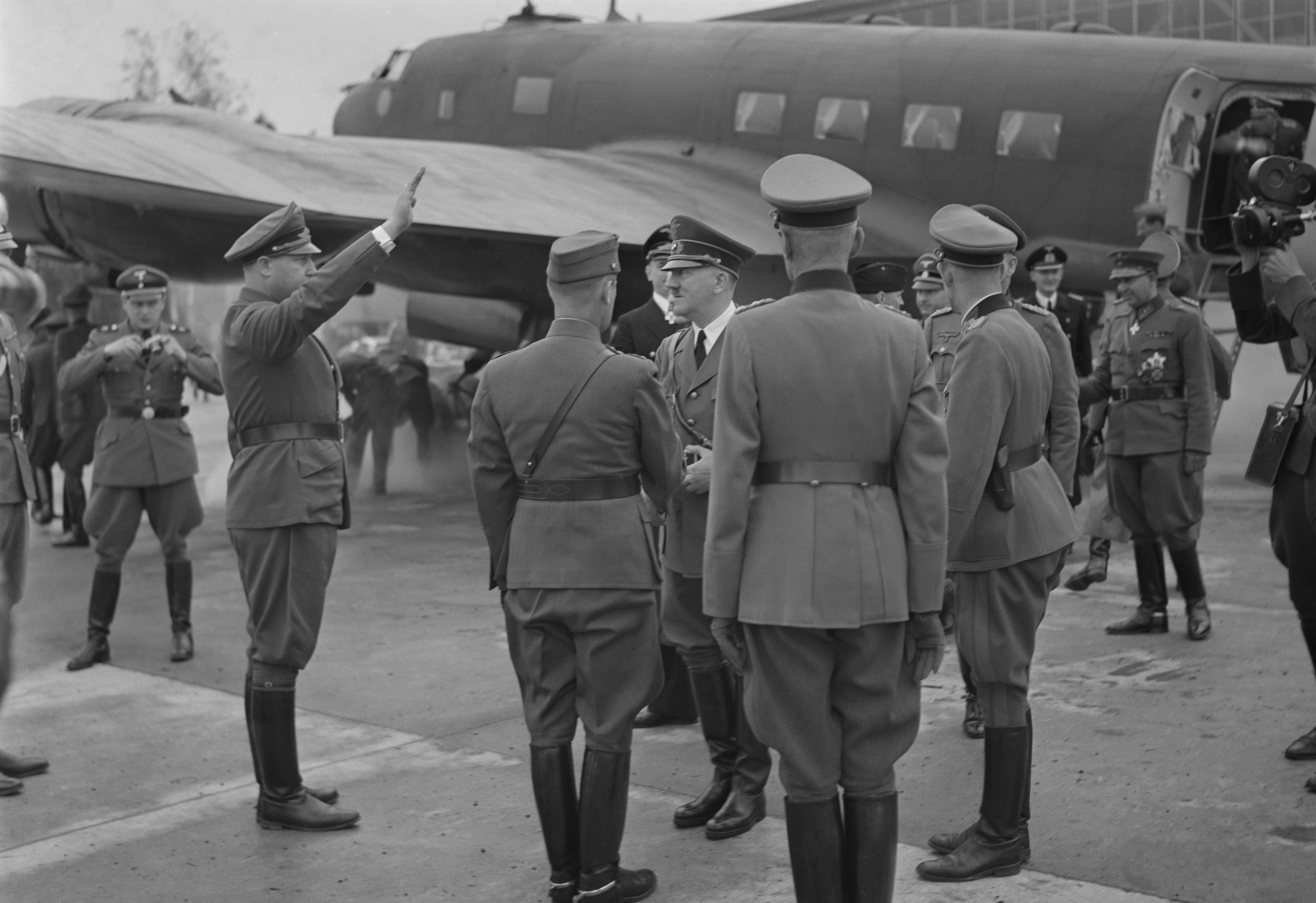 Hitlerin vierailu Suomessa. (Tervehtimässä lähettiläs Walther Hewel, keskellä kasvot kameraan päin Adolf Hitler. Taustalla sammutetaan lentokoneen palavaa rengasta. Taustalla on Focke-Wulf Fw 200C-3/U9). Kuvauspaikka: Immolan lentokenttä